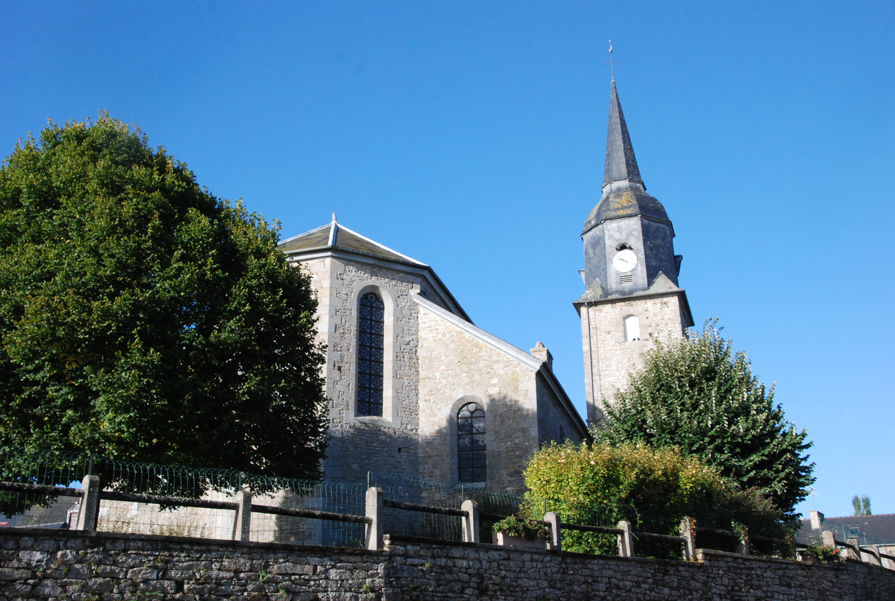 Eglise de Trébry, Côtes d'Armor